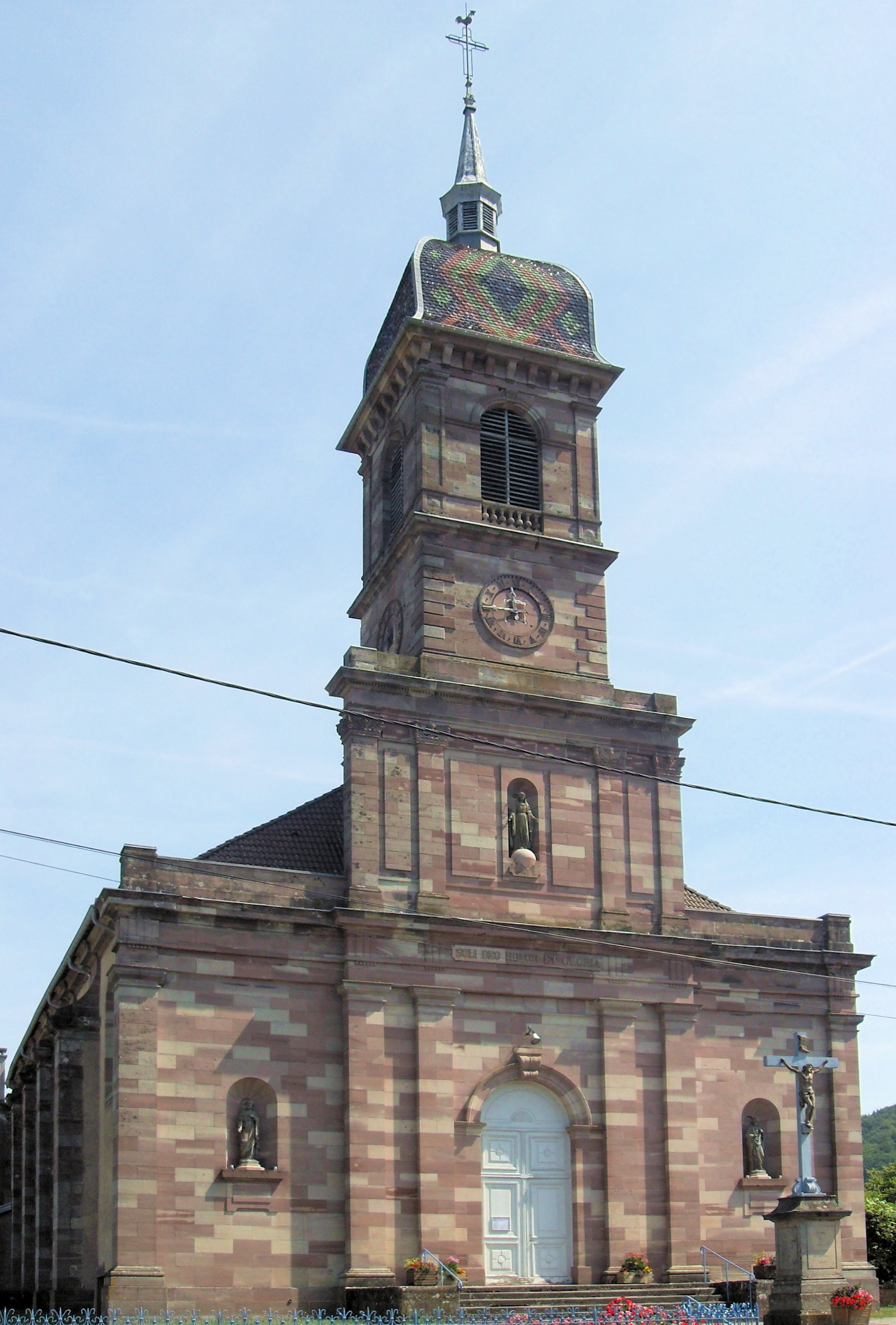 L'église de la Visitation à Raddon-et-Chapendu